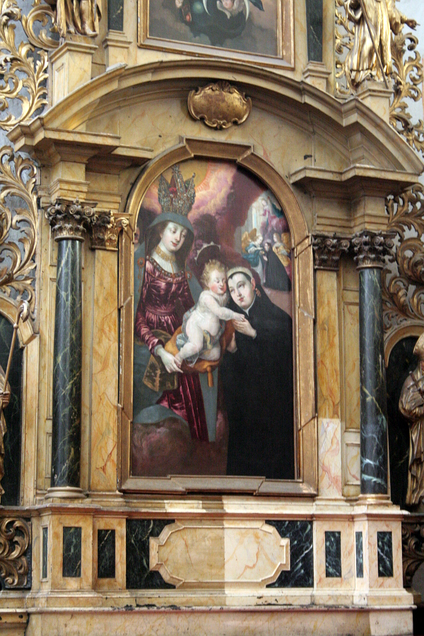 Kościół śś. Janów w Toruniu, obraz Wizja Św. Stanisława Kostki w kaplicy św. Stanisława Kostki, mal. Barłomiej Strobel, 1643 lub 1644